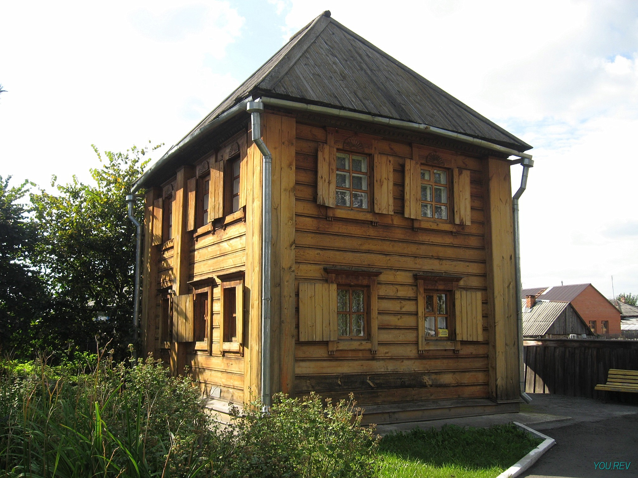 Дом Якушкина